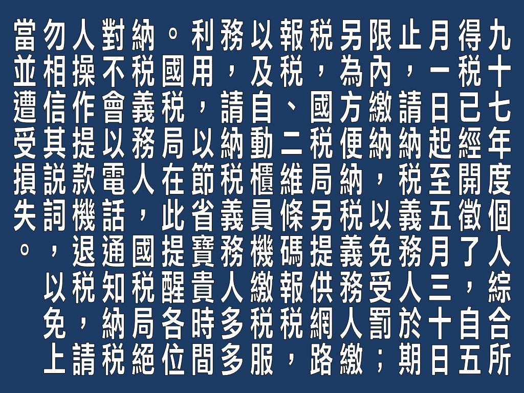 台視版政令宣導字卡，此為模擬個人綜合所得稅開徵。請注意，九十七年度個人綜合所得稅的政令宣導內容為虛構內容，故此圖為模擬，並非由電視畫面直接擷圖。